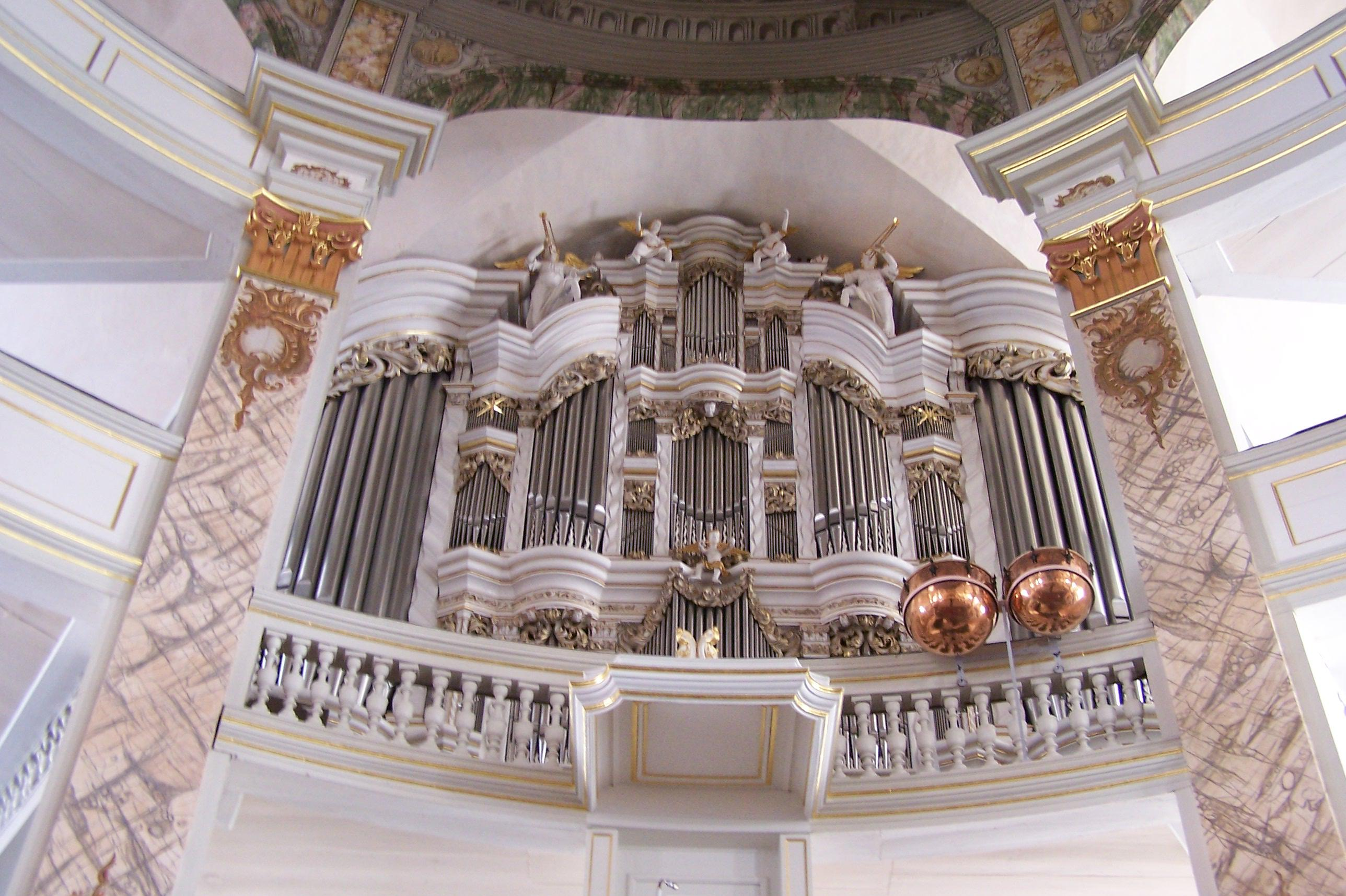 Die Waltershäuser Orgel von Heinrich Gottfried Trost.